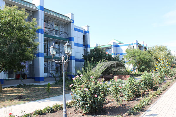 База отдыха